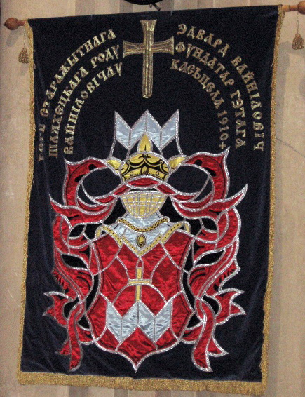 Беларуская (тарашкевіца): Герб Вайніловічаў у Чырвоным касьцёле